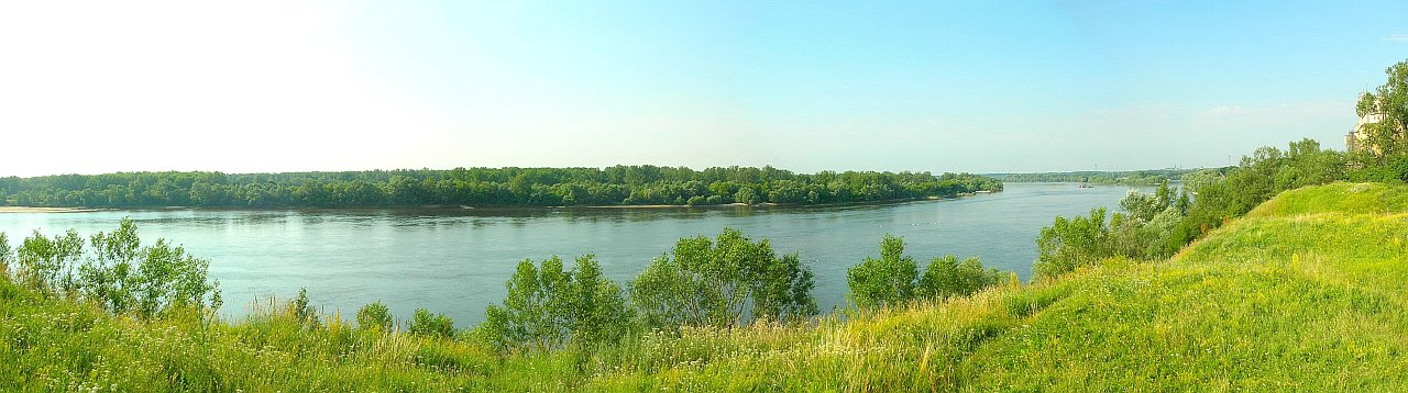 Widok z grodziska Wyszogród na Wisłę